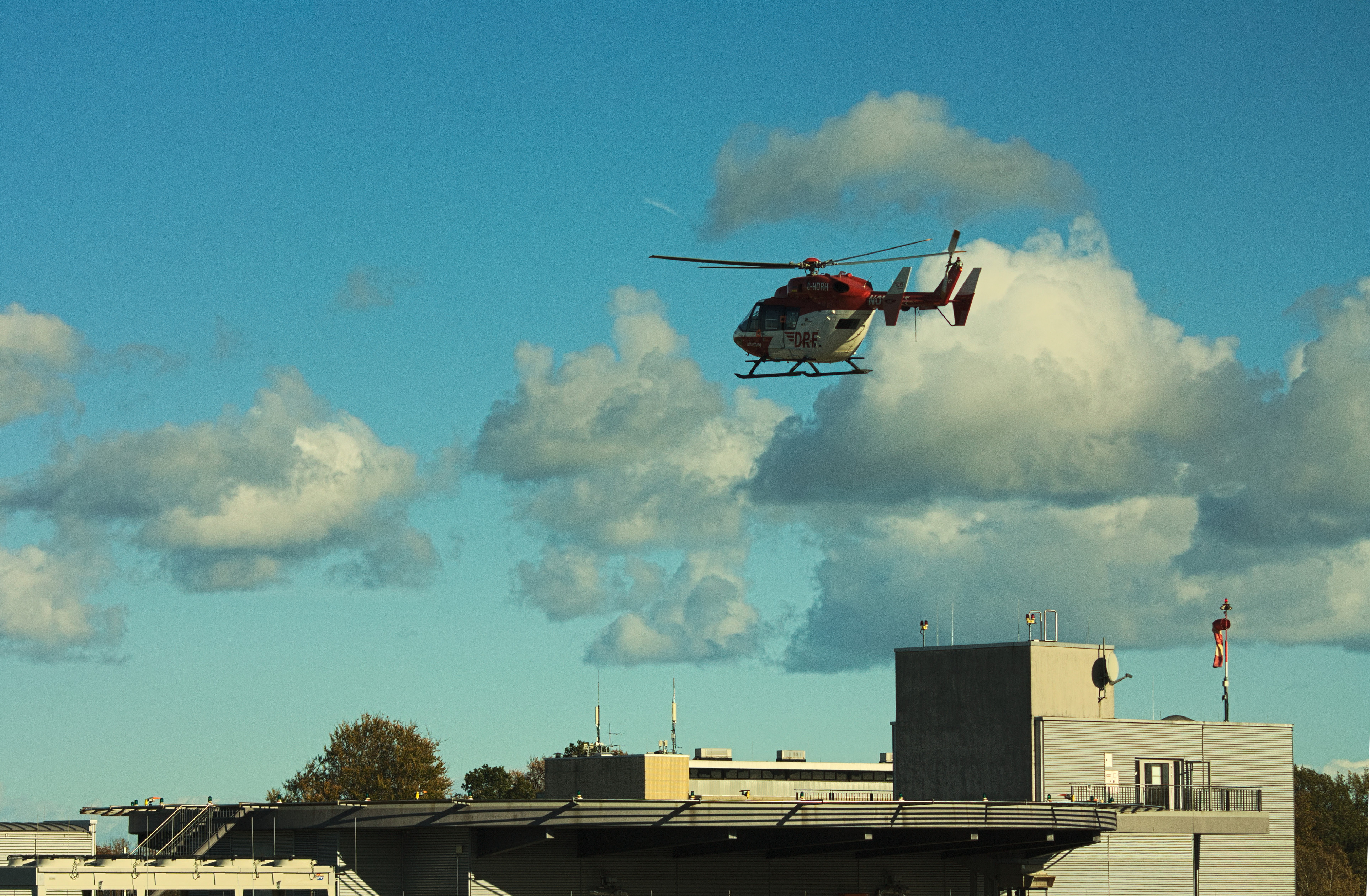 DRF Rettungshubschrauber D-HDRH start vom UKSH Kiel.